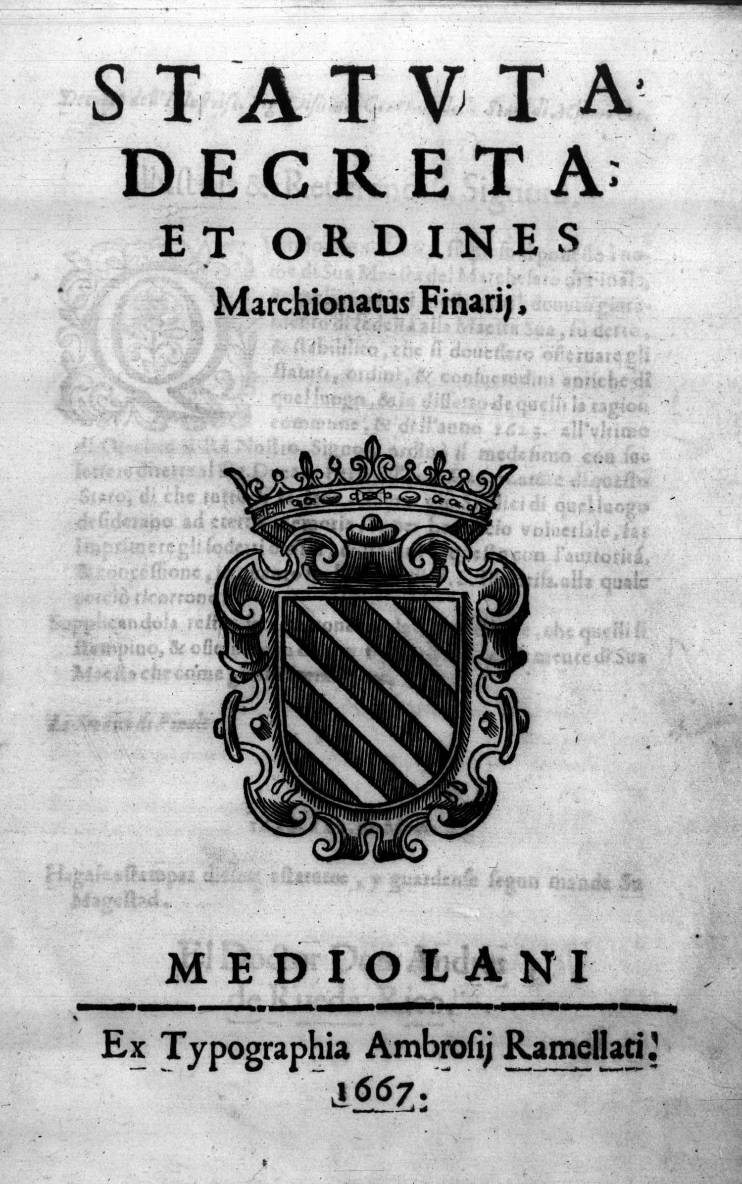 Frontespizio